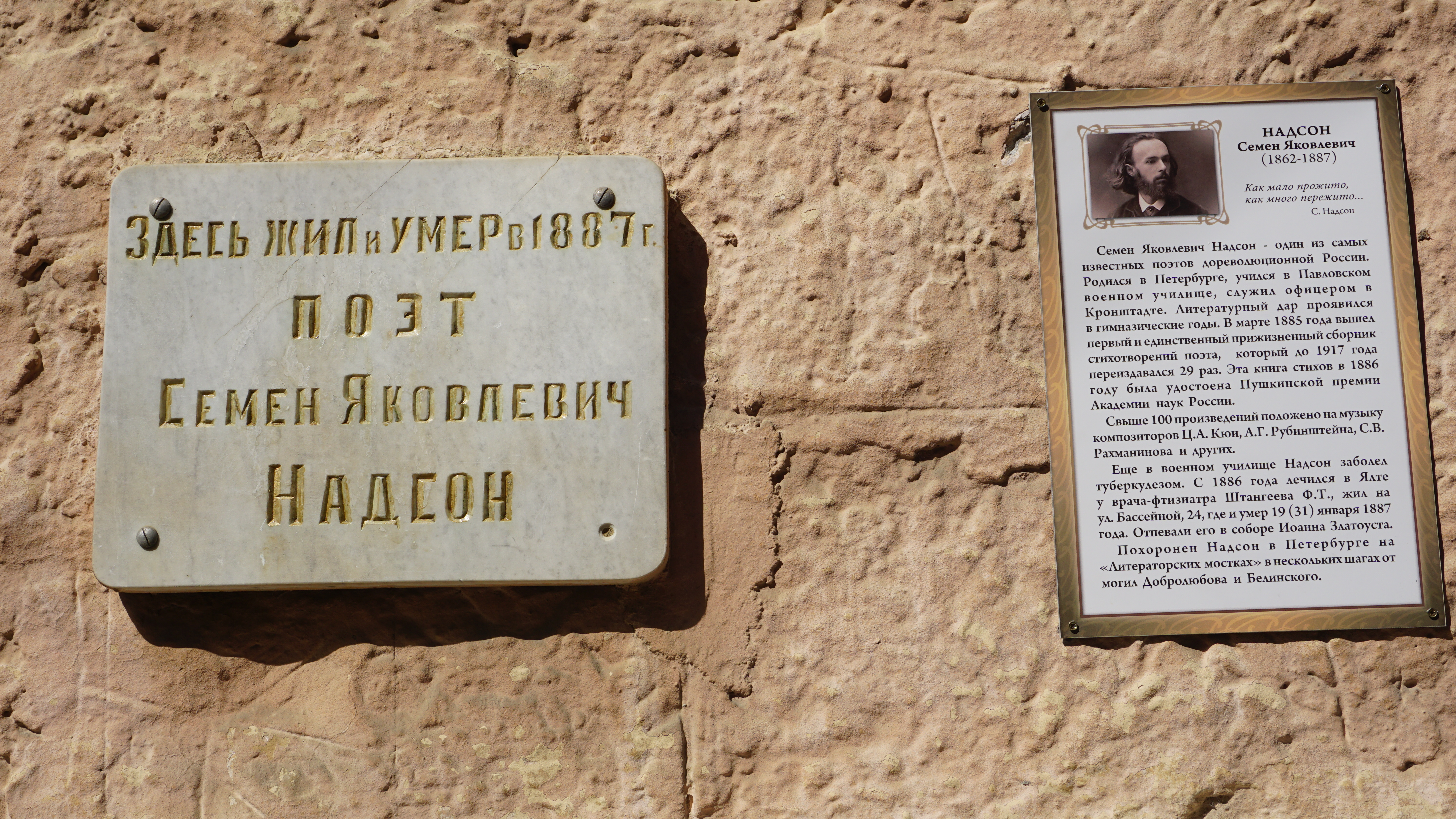 Дом, в котором в 1886-1887 гг. жил поэт С.Я.Надсон: улица Бассейная, 24, Ялта, Крым This object is located on the Crimean Peninsula and recognized as cultural heritage by Russia under the monument ID: 8231494000. The legal status of the Crimean region is currently disputed.